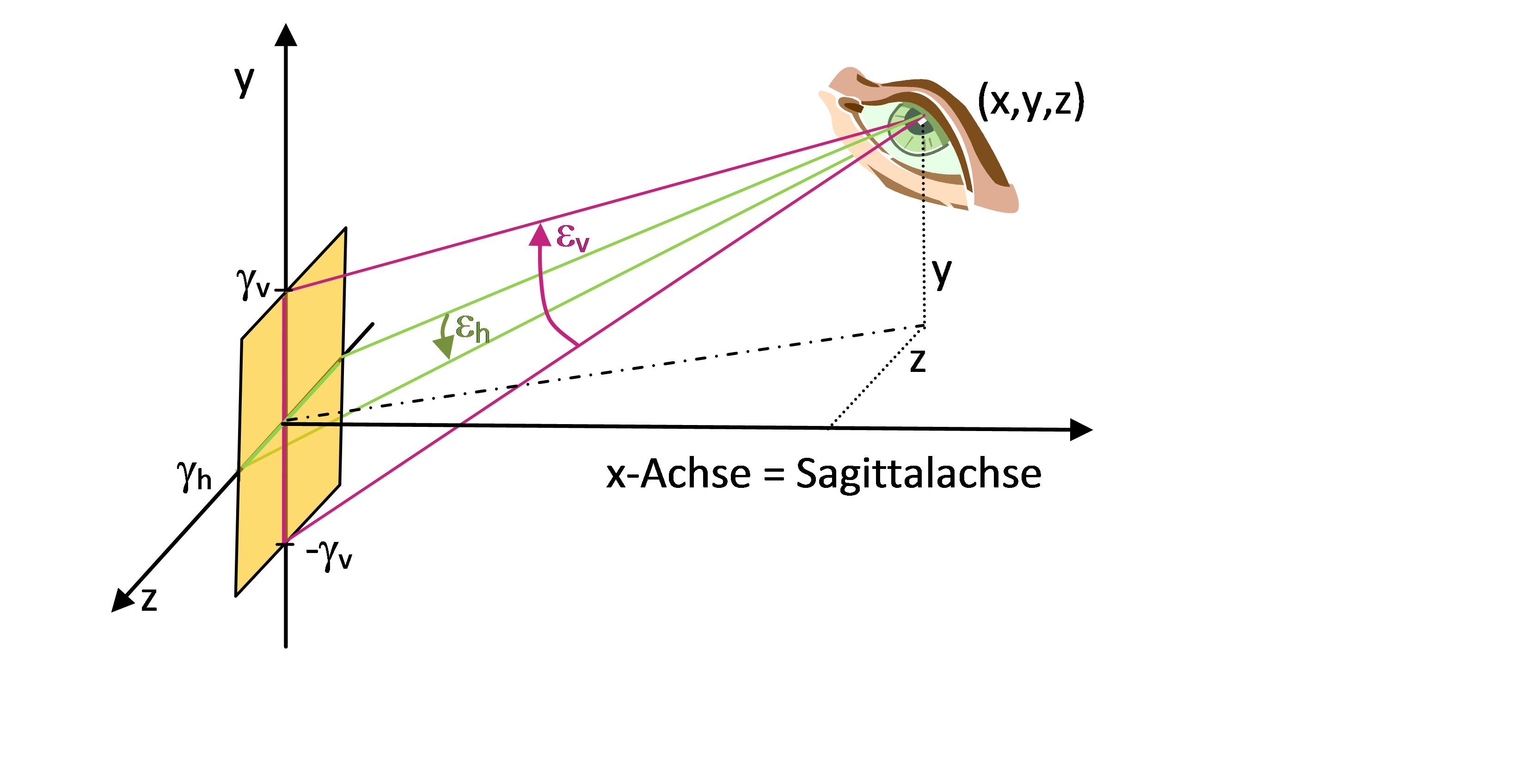 Vertikaler und horizontaler Sehwinkel eines Gegenstands